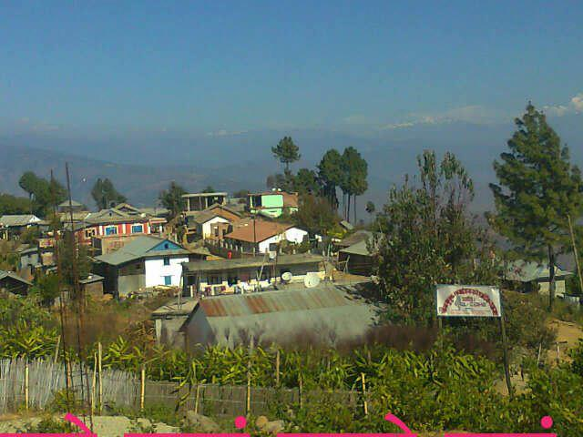 नेपाली: मौनाबुधुक धनकुटा जिल्लाको एक गाविस हो ।